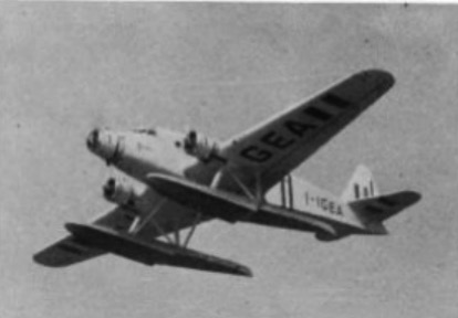 Savoia Marchetti SM.87 idro